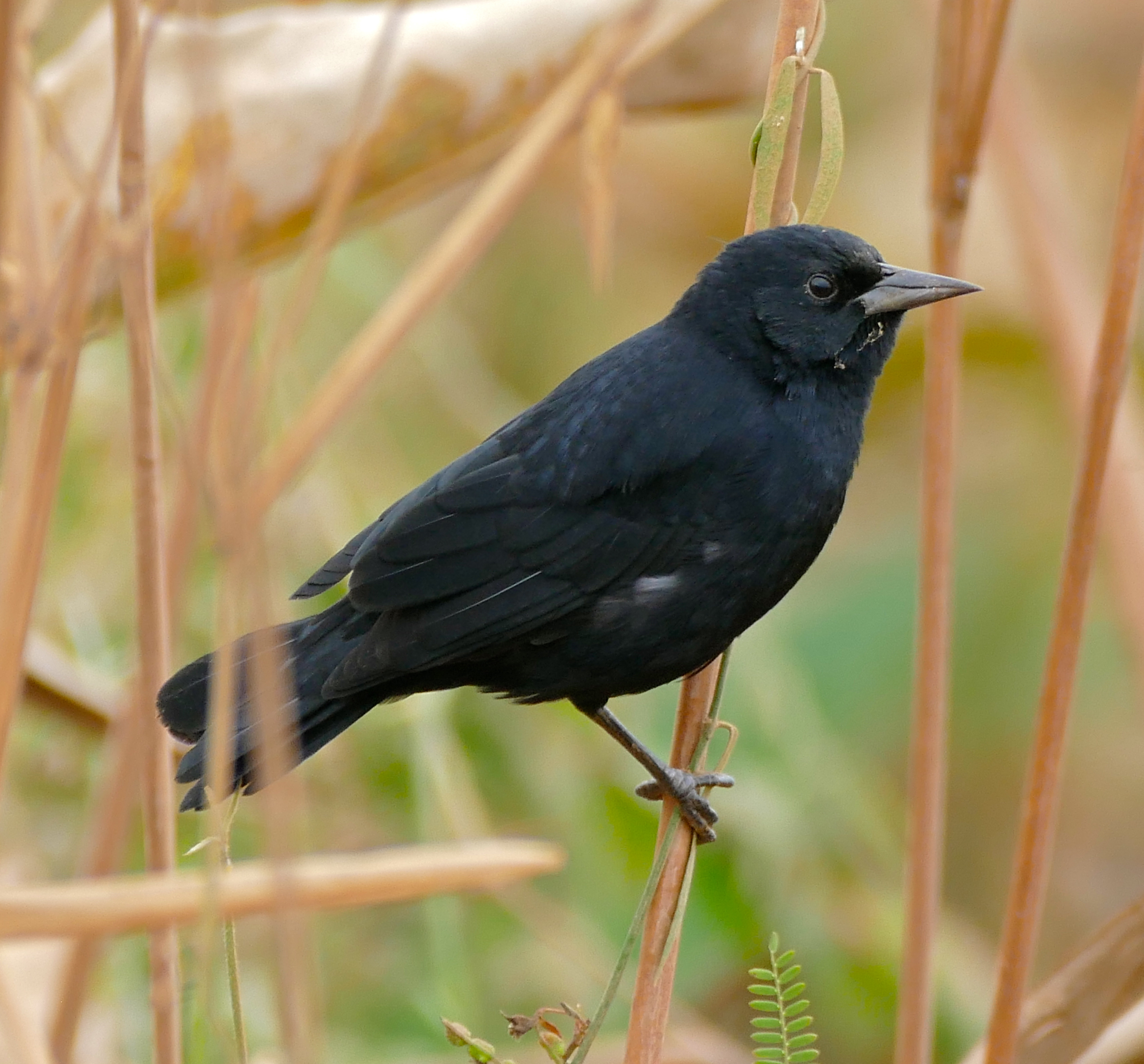 Transpantaneira, Poconé, Mato Grosso, BRAZIL